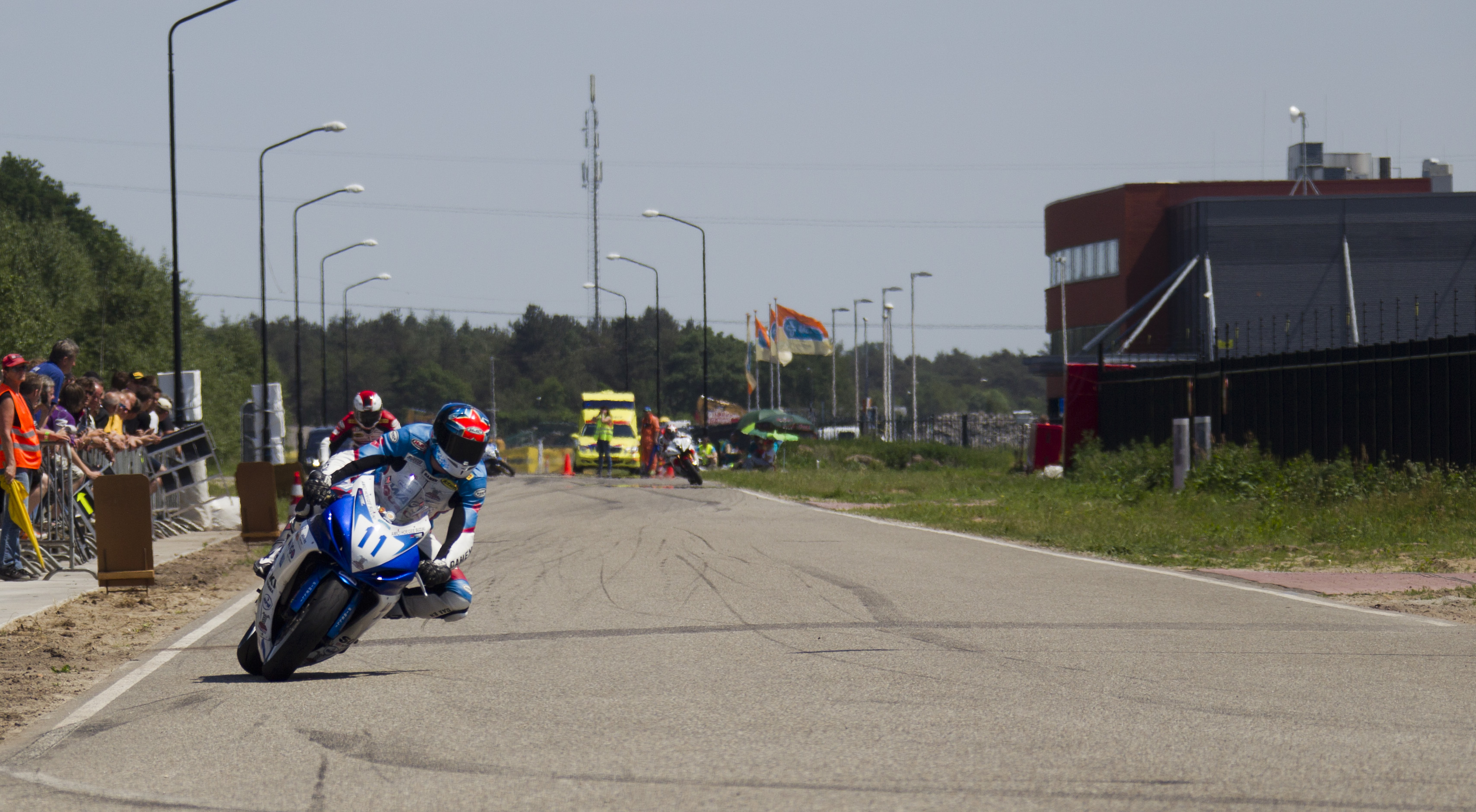 Wegrace op industrieterrein Vorstengrafdonk in Oss, Noord-Brabant, tijdens pinksteren in 2012. Zie: Circuit Paalgraven